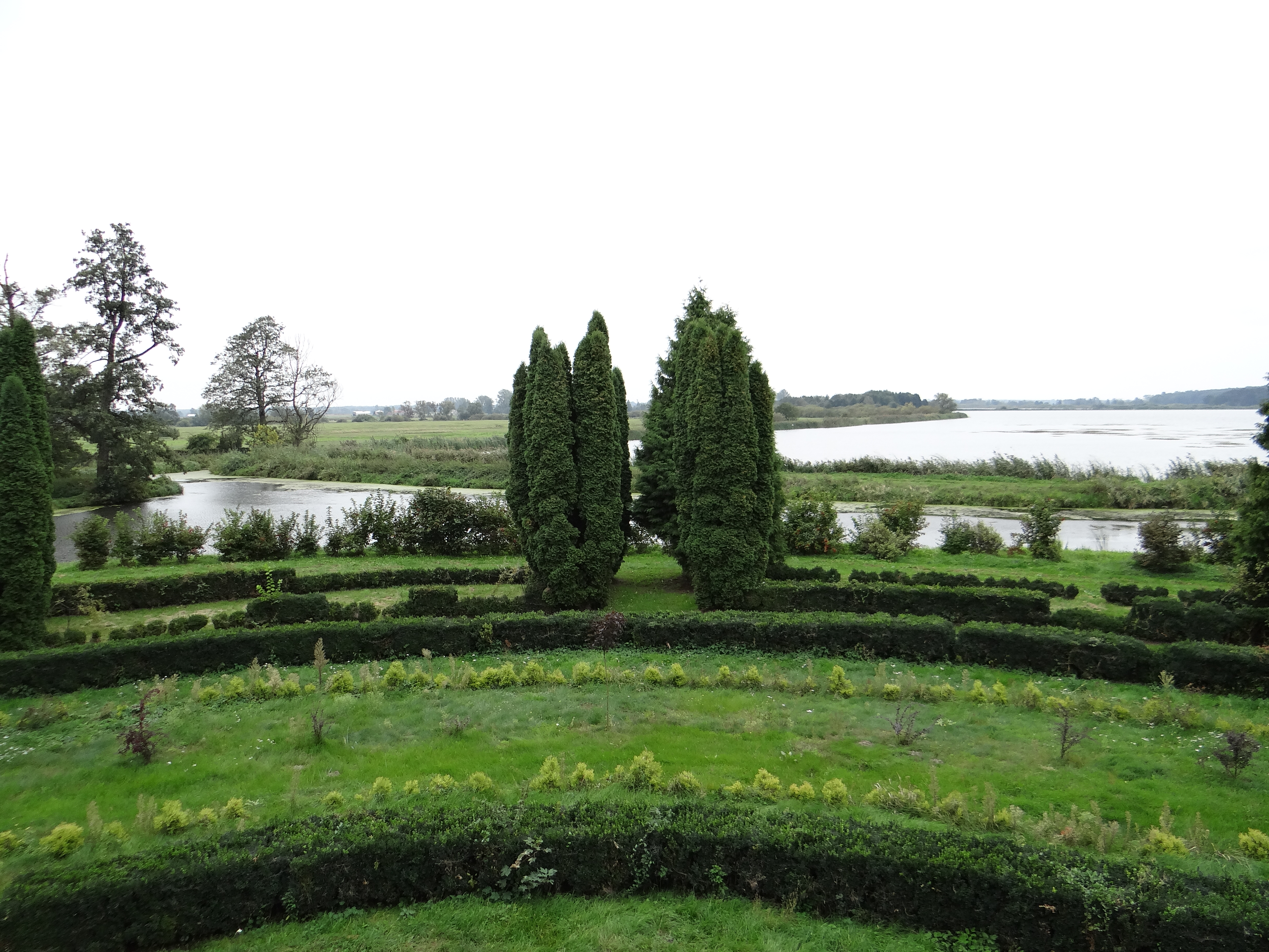 Pałac Anny Jabłonowskiej w Kocku - widok z tarasu na park